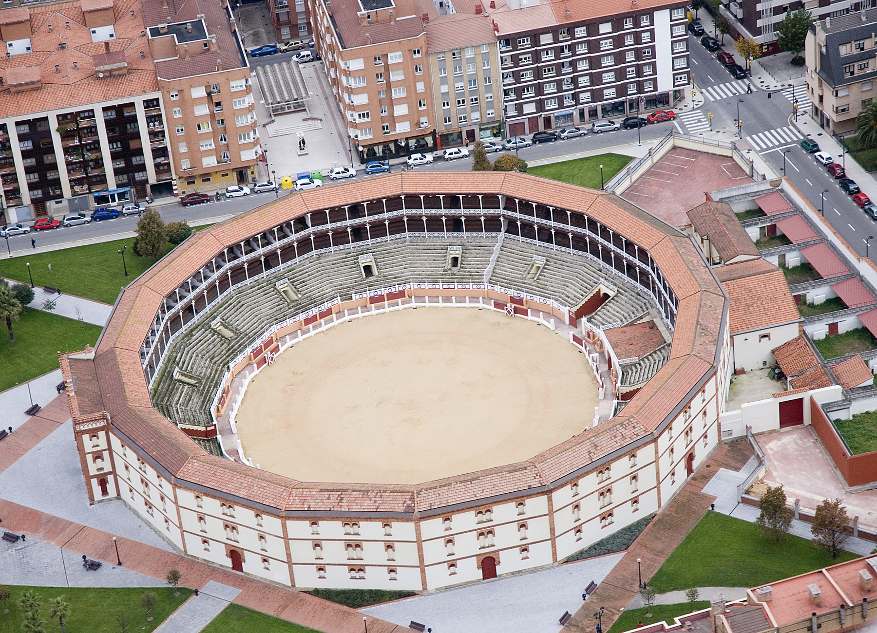 Plaza de Toros del Bibio